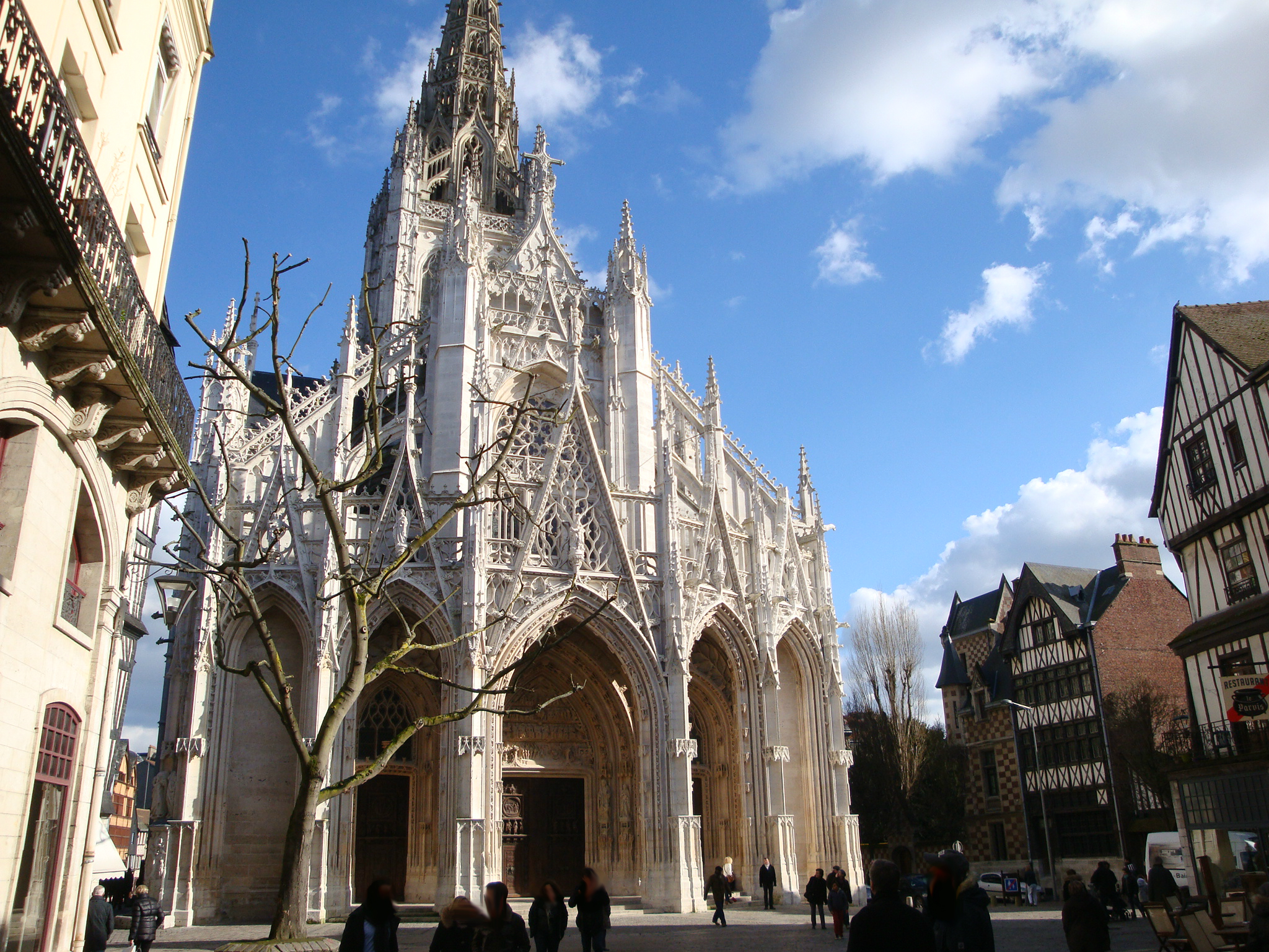 Eglise Saint Maclou après rénovation